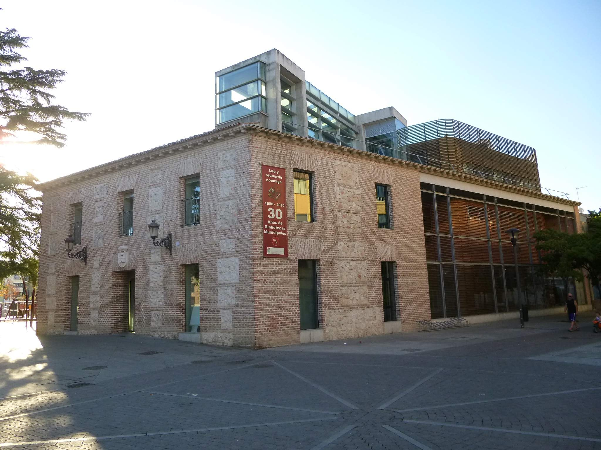 San Fernando de Henares (Comunidad de Madrid)